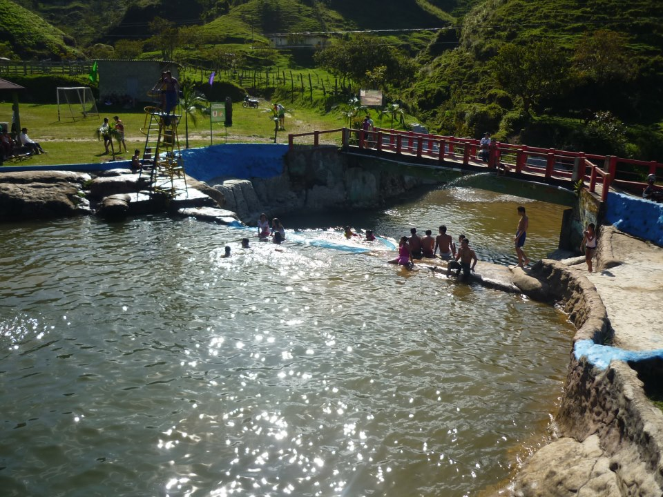 Piscina Natural